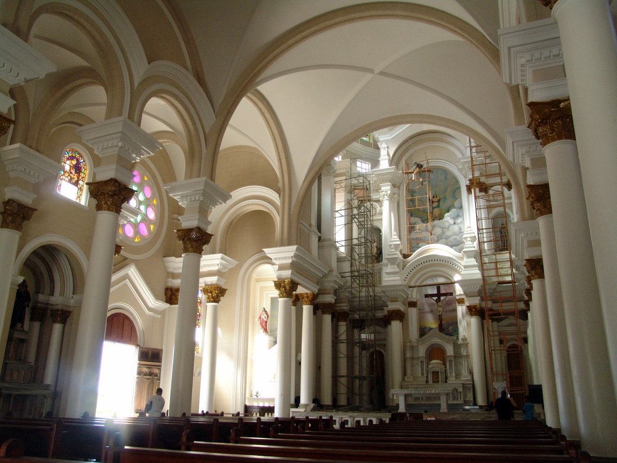 Interior da Igreja de São Sebastião (2)